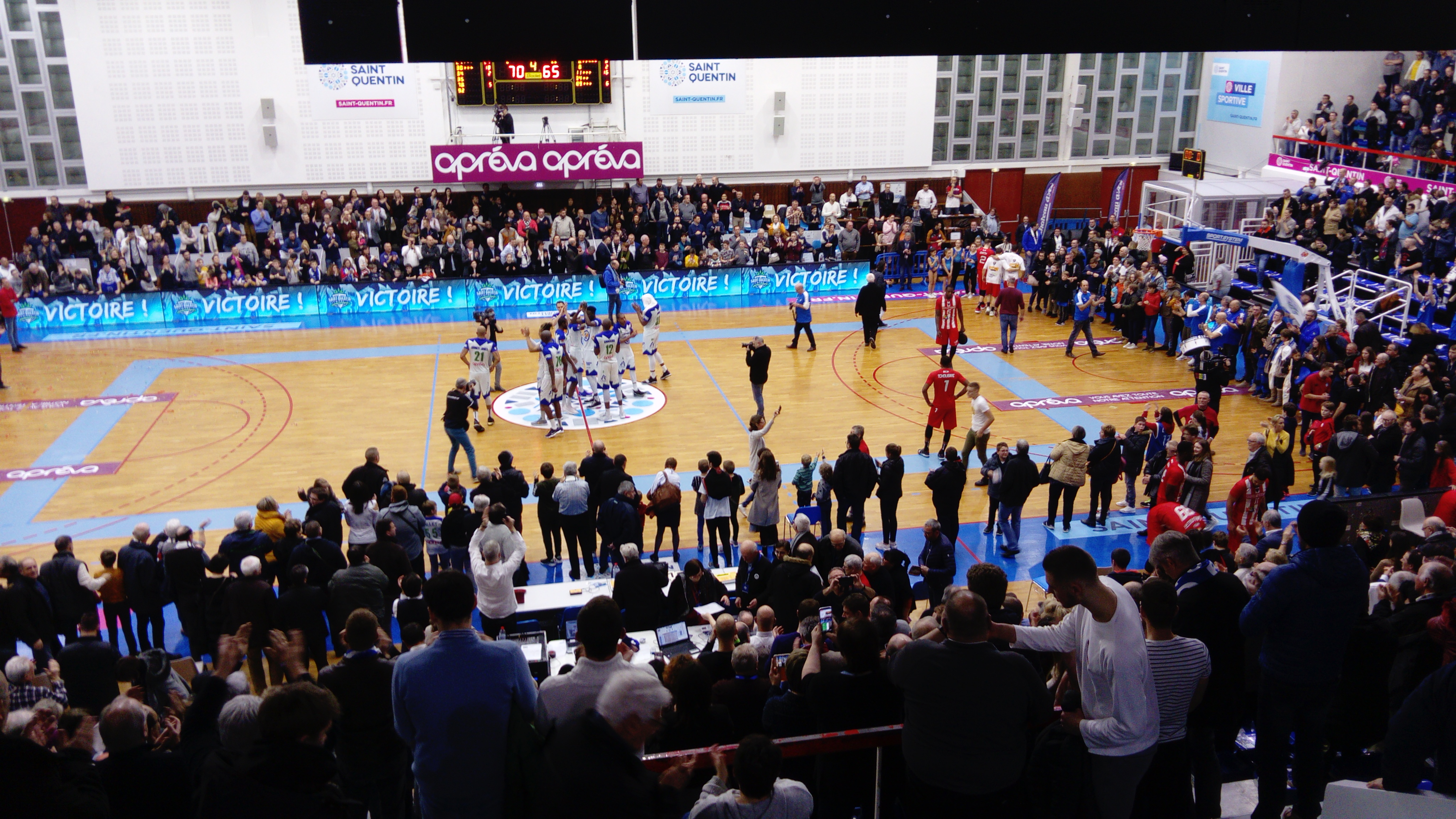 Palais des Sports Match du 03-02-2019